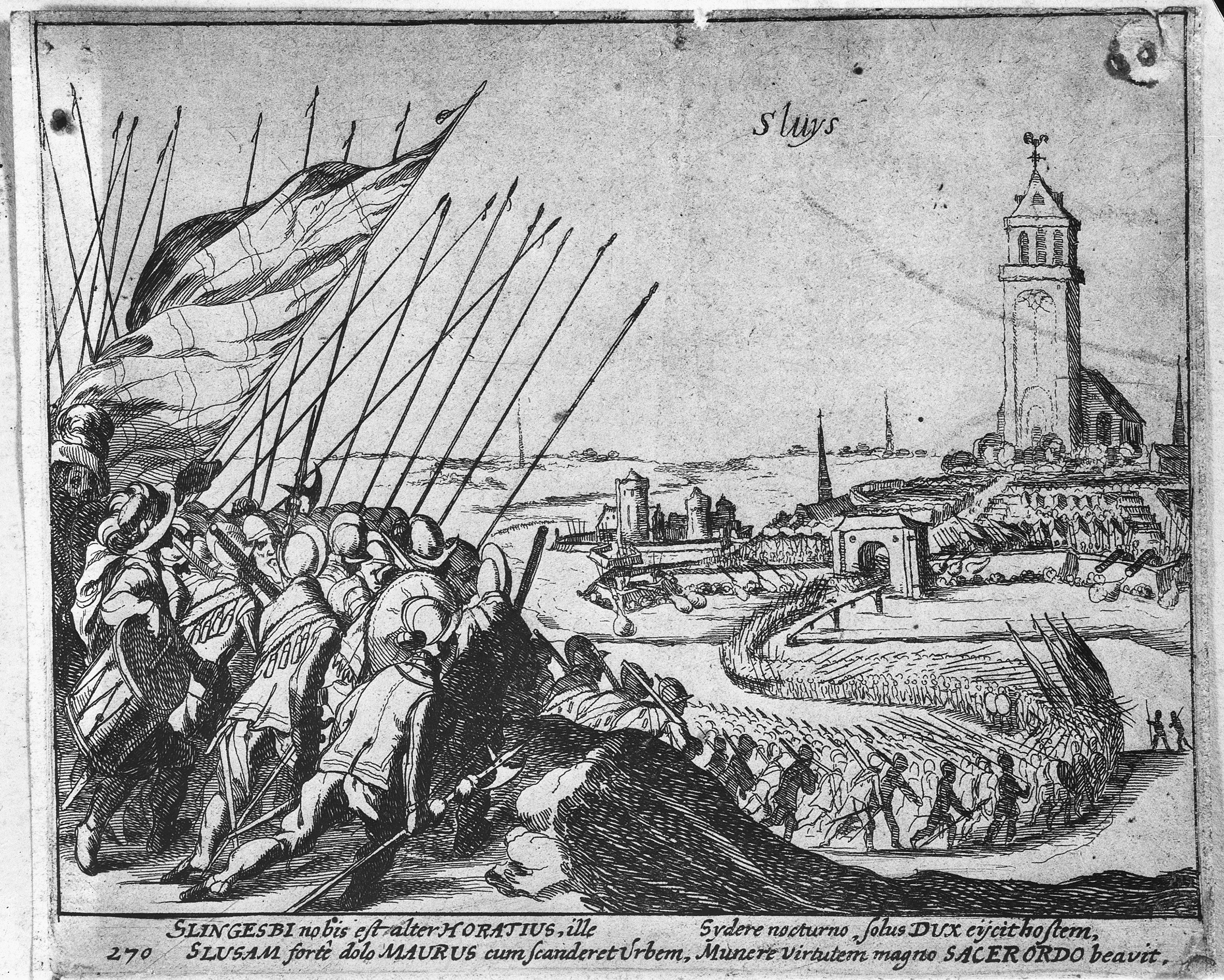 foto naar tekening in Gemeente Archief te Sluis